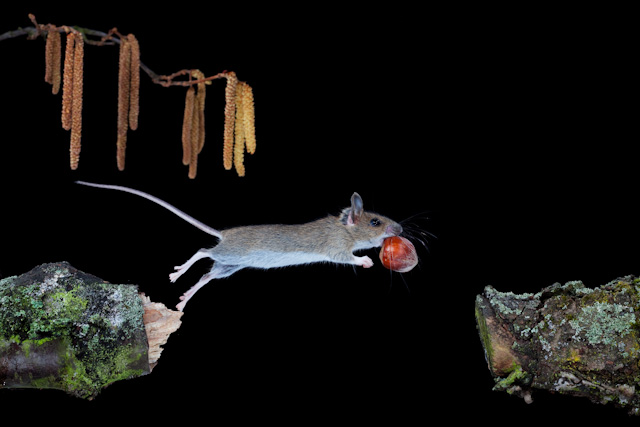 Waldmaus im Sprung